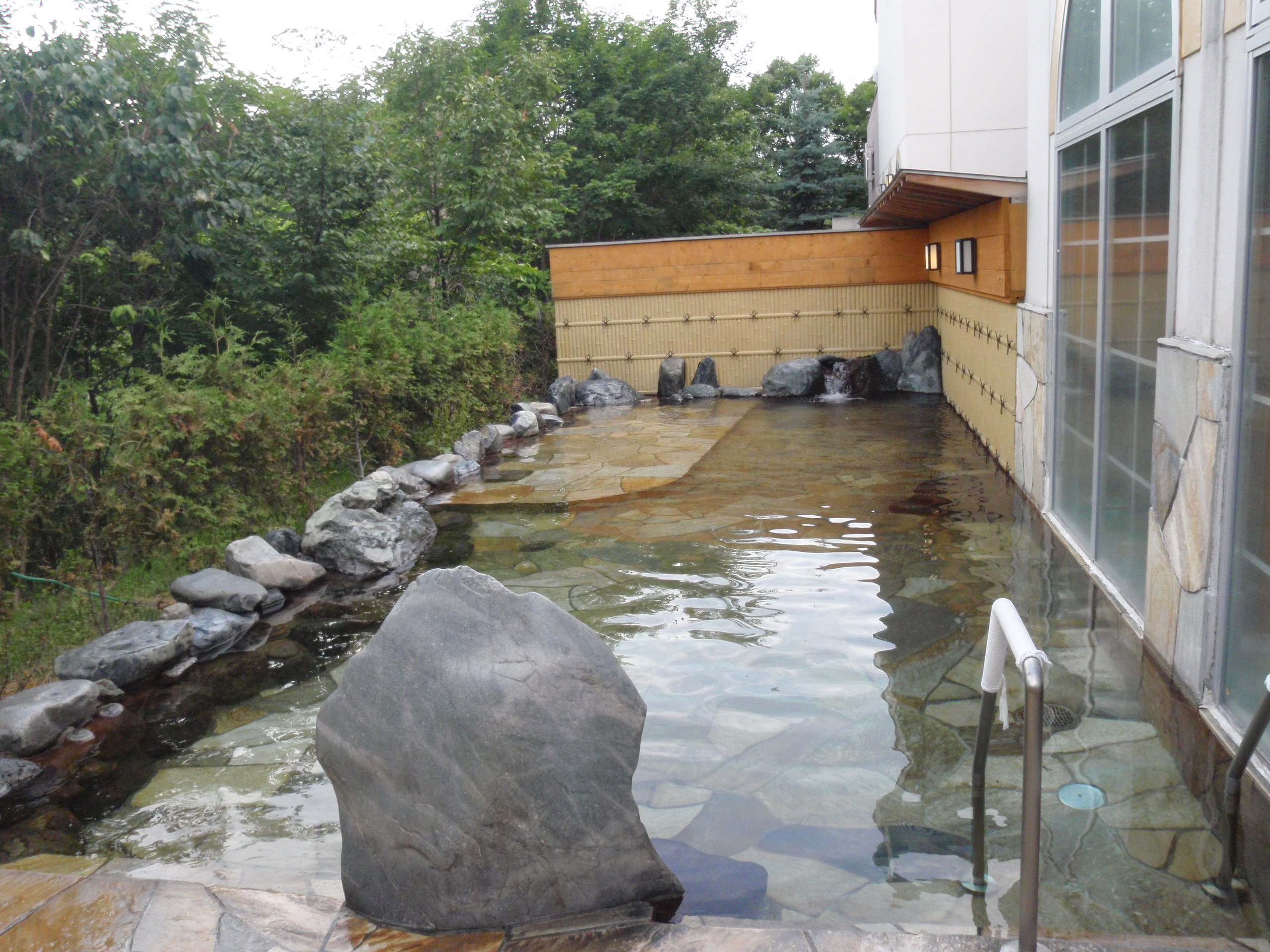 丸瀬布温泉、マウレ山荘露天風呂